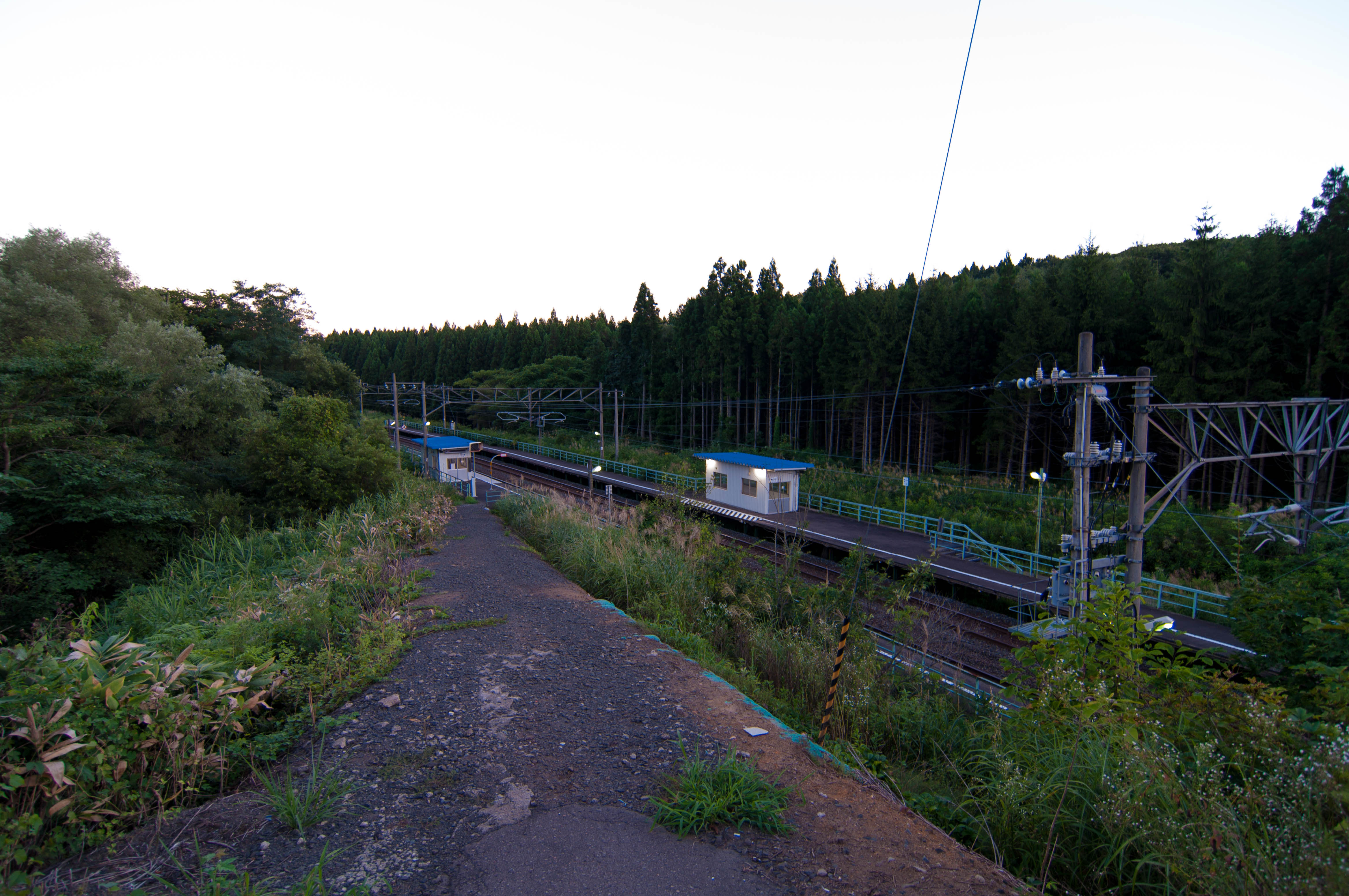 東日本旅客鉄道東北本線千曳駅全景